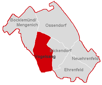 Lagekarte Vogelsang im Stadtbezirk Köln-Ehrenfeld